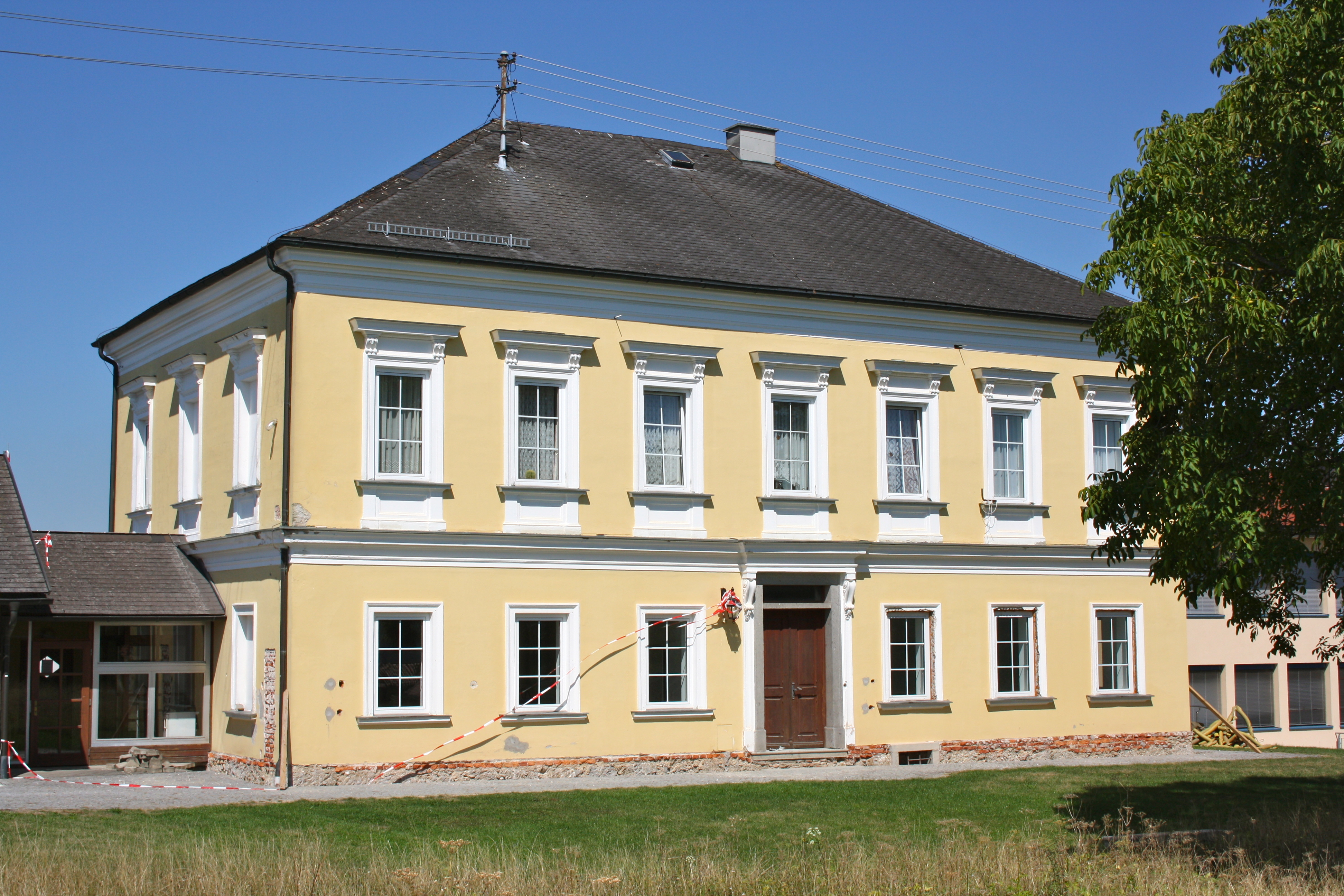 Pfarrhof